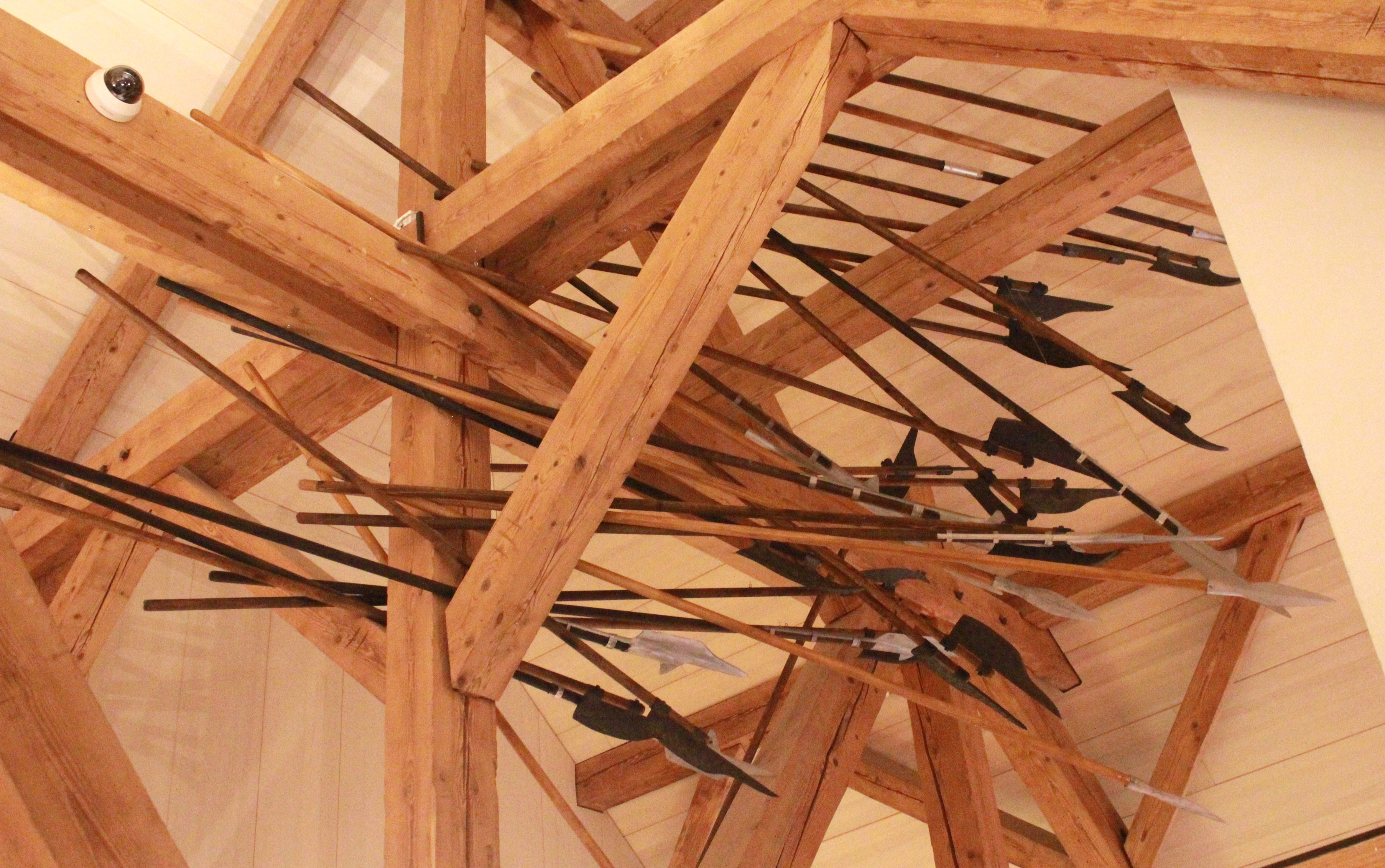 Hellebarden an der Dachgeschossdecke im Ausstellungsbereich rund um die Schlacht von 1386.